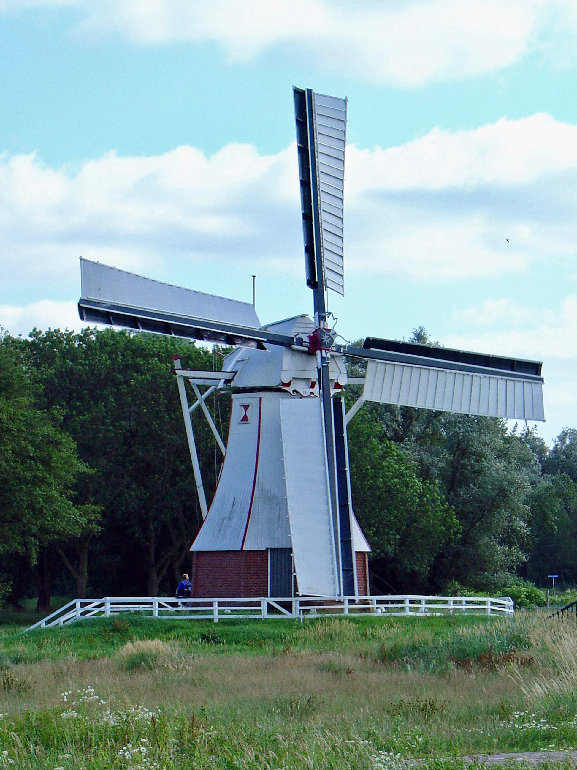 De witte molen (langs de A28) in de omgeving van Haren (Glimmen)